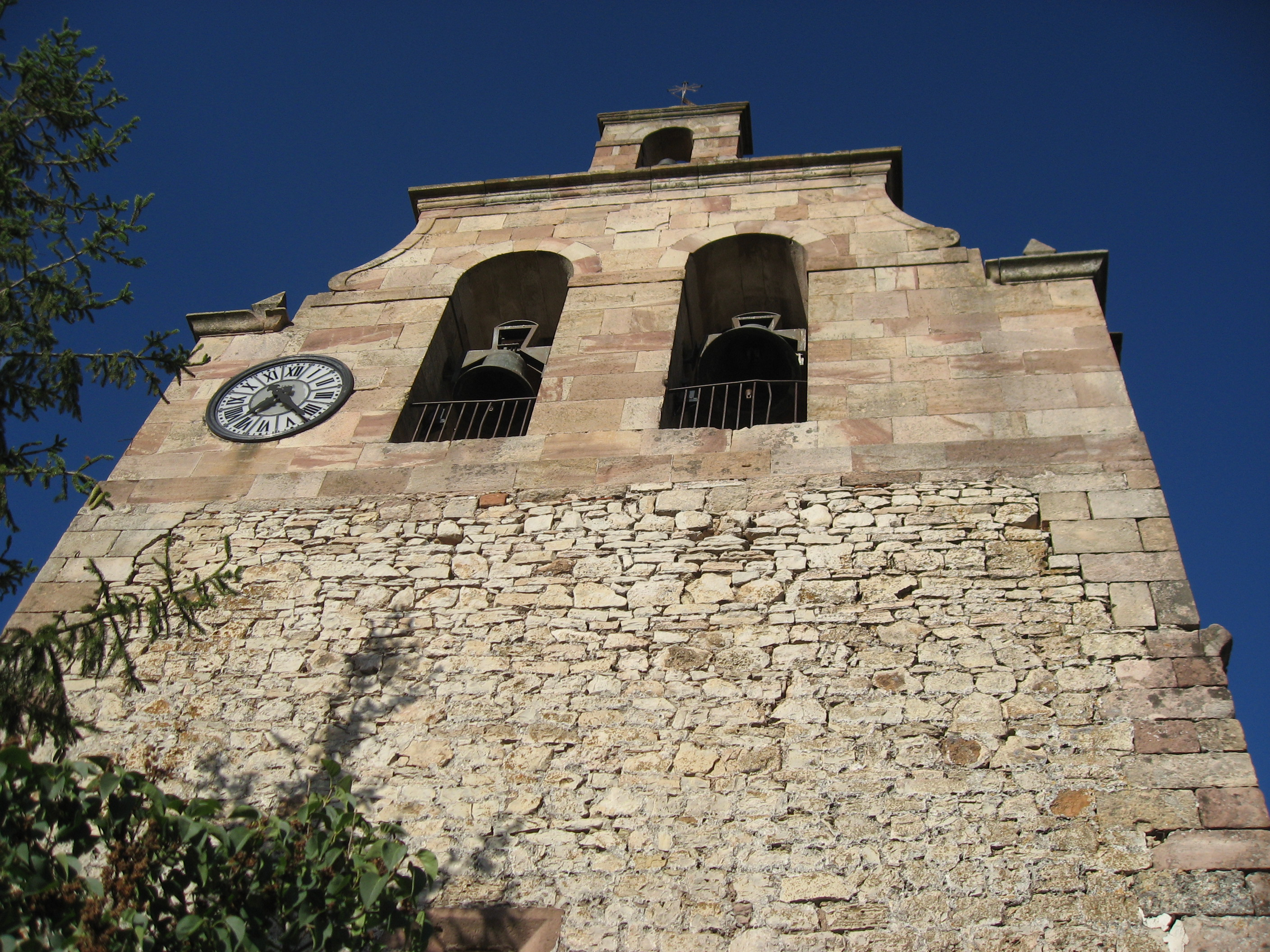 Frontal de la Ermita de la Virgen de la Lastra (Anguita, Guadalajara)